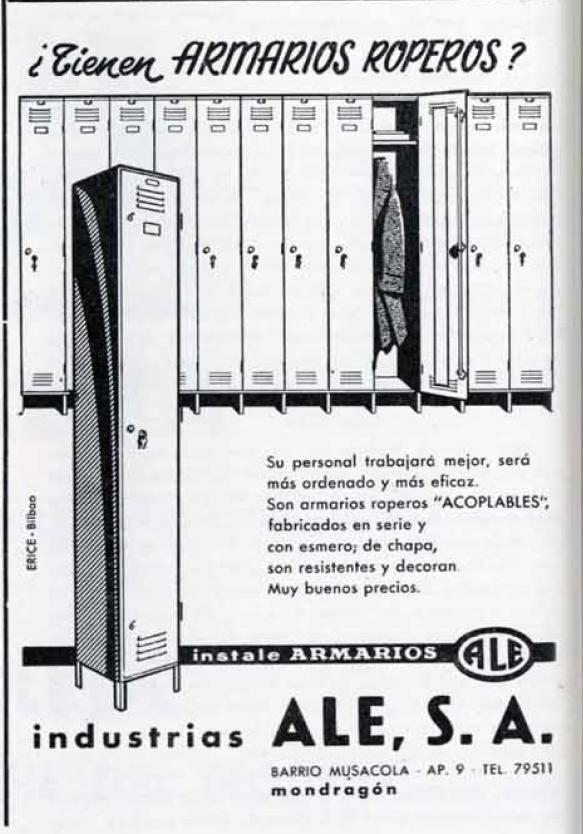 ¿Tienen ARMARIOS ROPEROS? Su personal trabajará mejor, será más ordenado y más eficaz. Son armarios roperos "ACOPLABLES", fabricados en serie y con esmero; de chapa, son resistentes y decoran Muy buenos precios. instale ARMARIOS ALE industrias ALE, S.A. BARRIO MUSACOLA - AP. 9 - TEL. 79511 mondragón